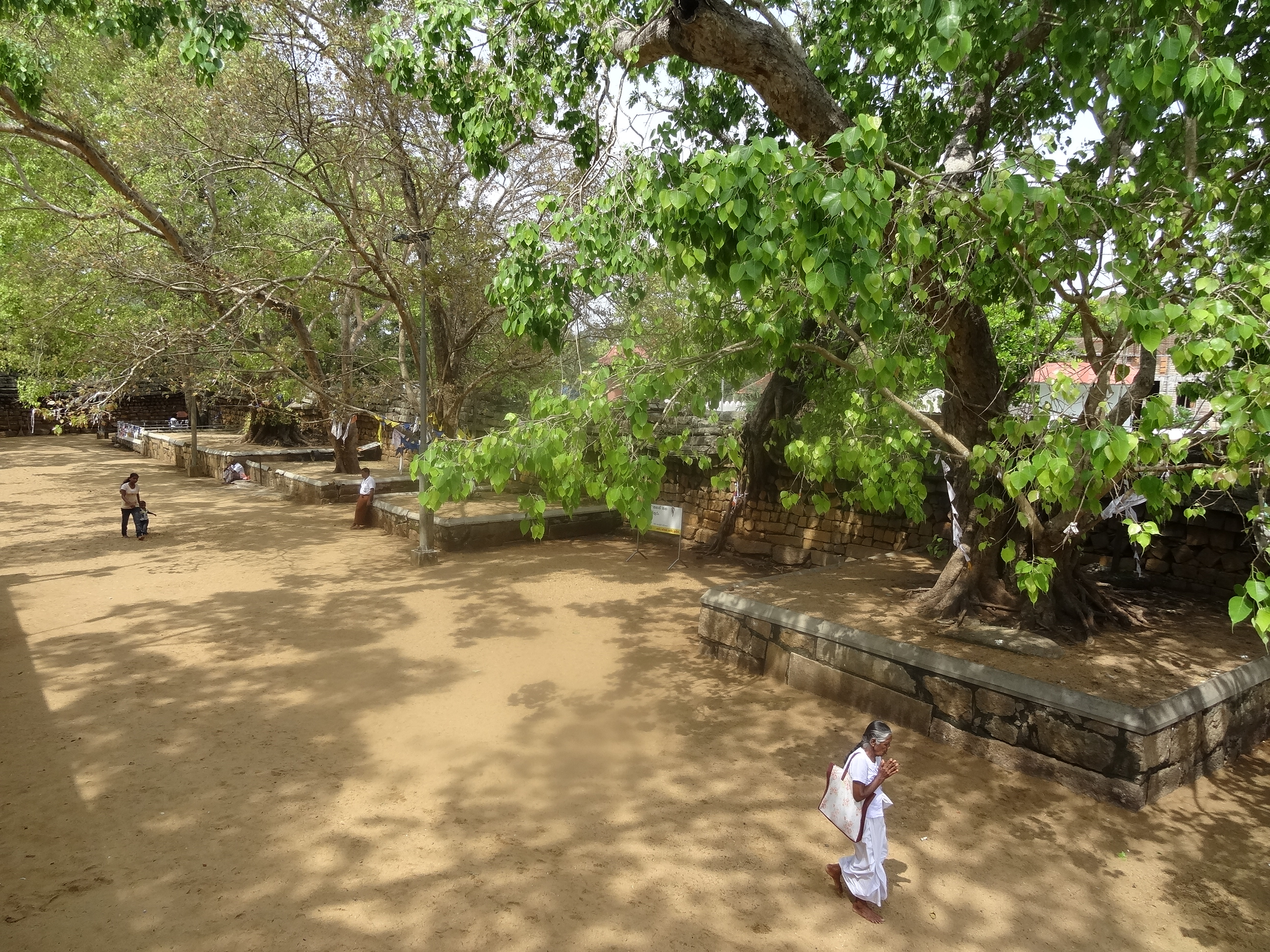 Jaya Sri Maha Bodhi